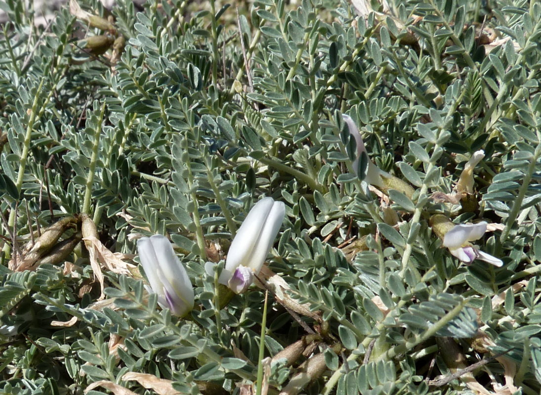 Astragalus tragacantha à Callelongue (Marseille, France)